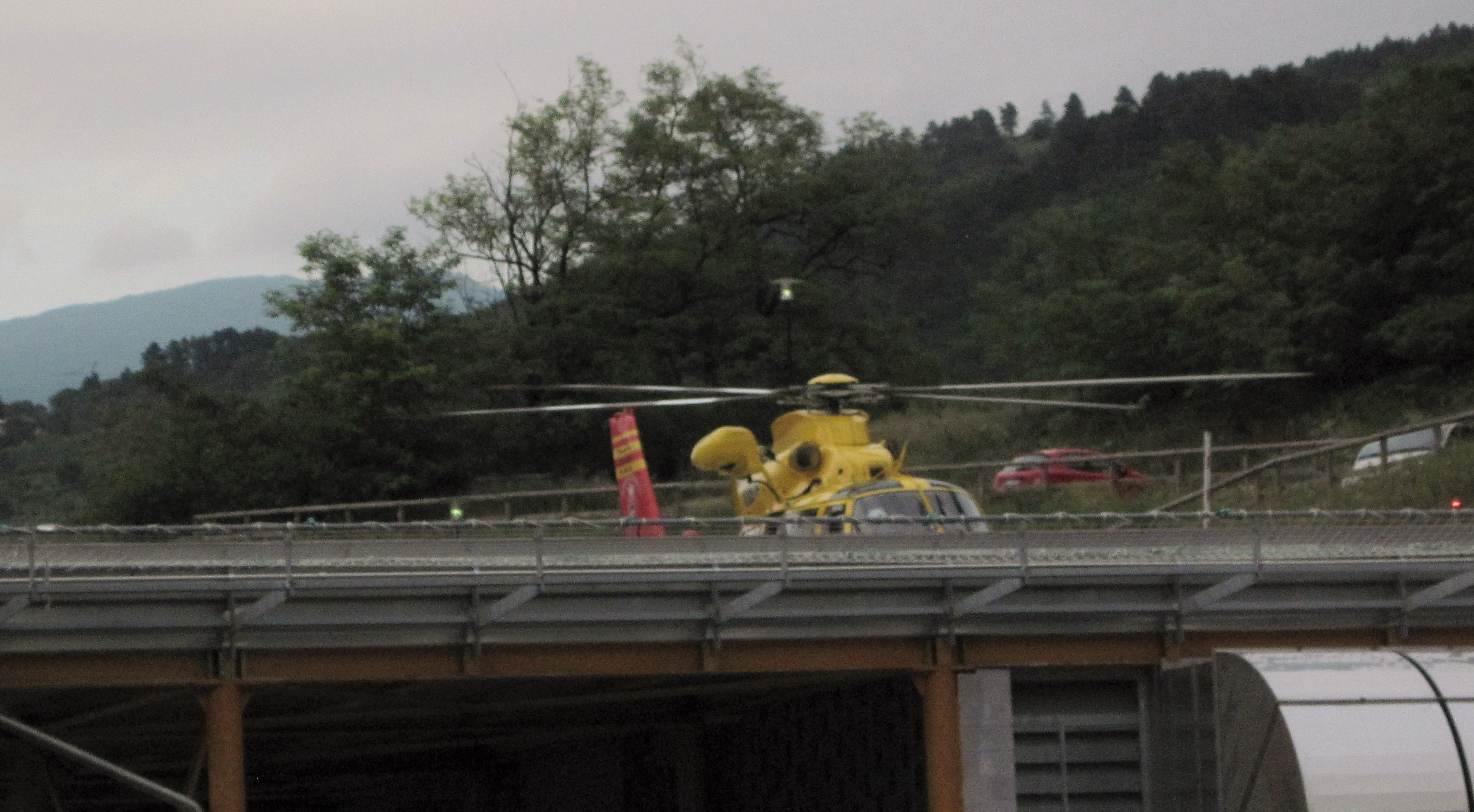 Ospedale Santa Maria del Carmine di Rovereto, mercoledì 27 luglio 2011, decollo in ore serali di un elicottero del 118 Trentino Emergenza (per me era un momento particolare, ed oggi nella mia memoria è ancora più imporante. Allora vivevo la speranza, ora mi resta solo il ricordo)